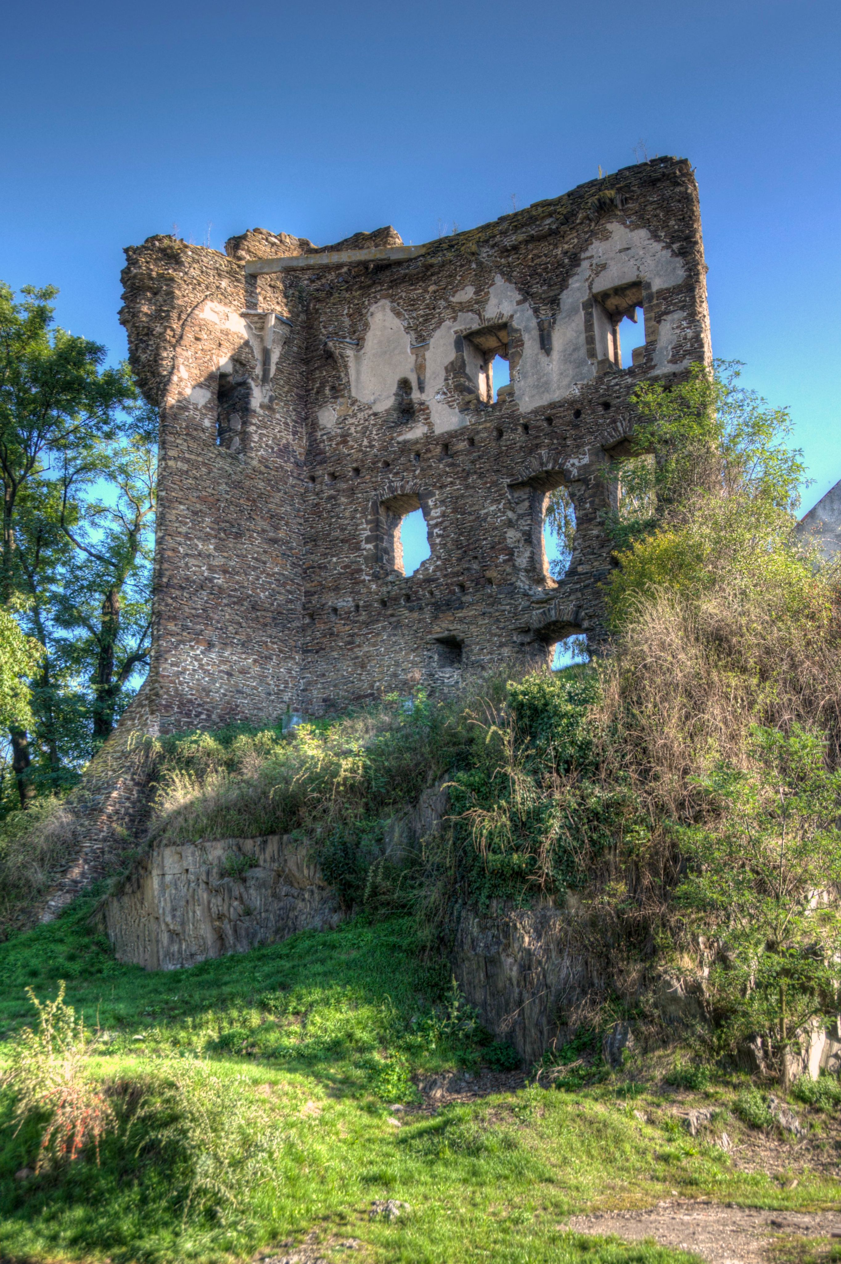 Zřícenina hradu Říčany - Torzo západního paláce od jihu